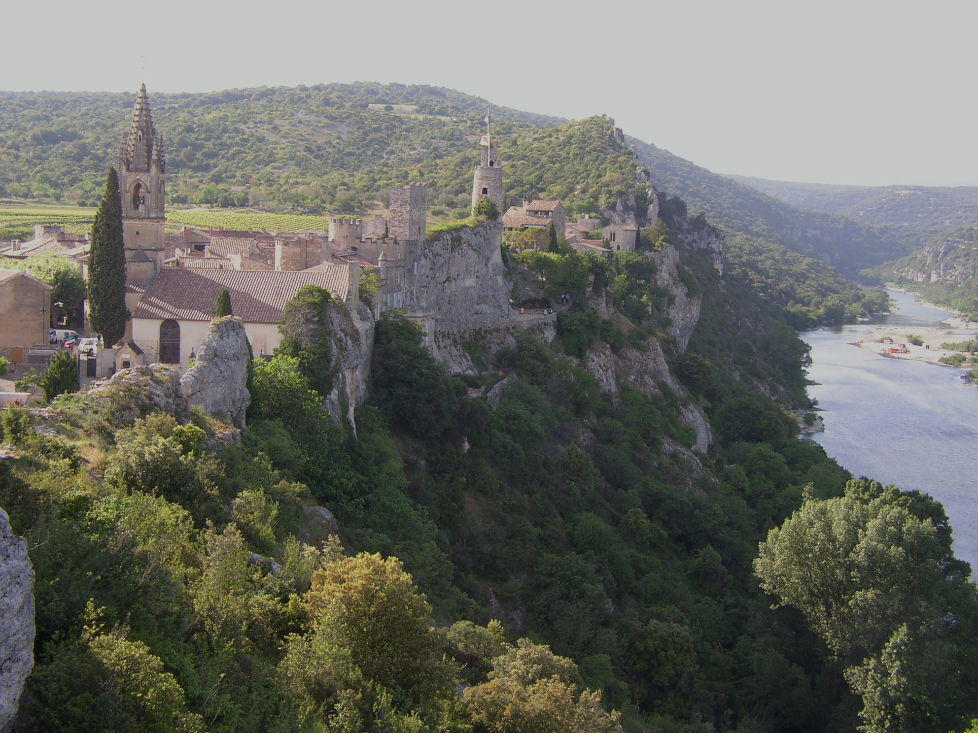 Aiguèze surplombant l'Ardèche